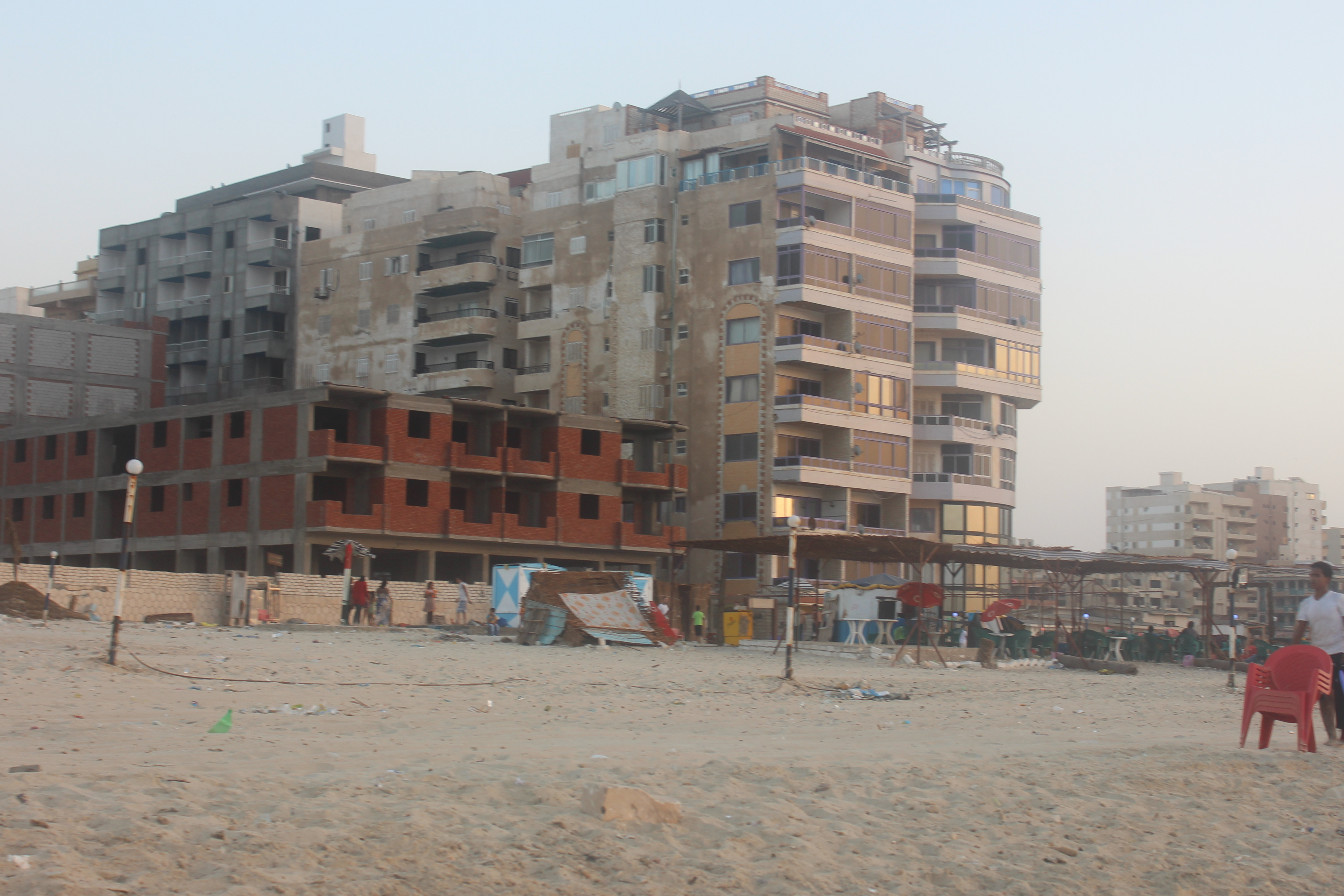 شاطئ السلام بالعجمي، مصر.